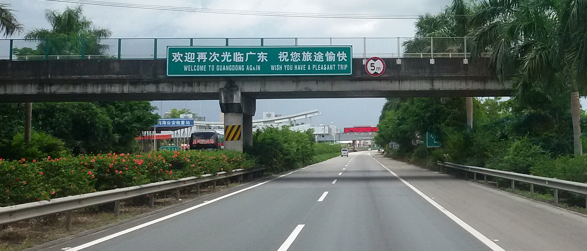 粵語: 兰海高速公路入面嘅两广交界。